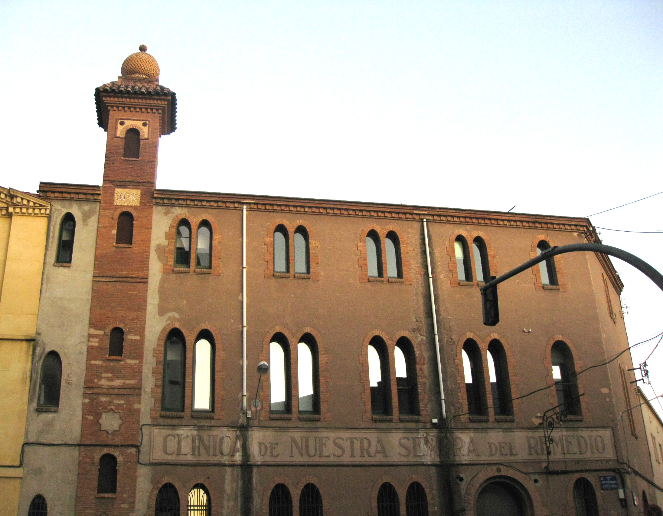 Clínica del Remei, dins el complex de l'Hospital de Sant Llàtzer, a Terrassa. Edifici neogòtic de Lluís Muncunill del 1907.